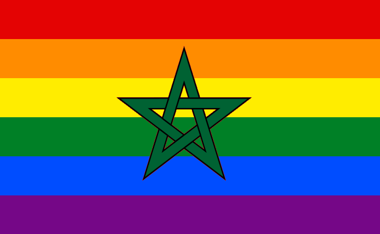 Bandera gay Marruecos